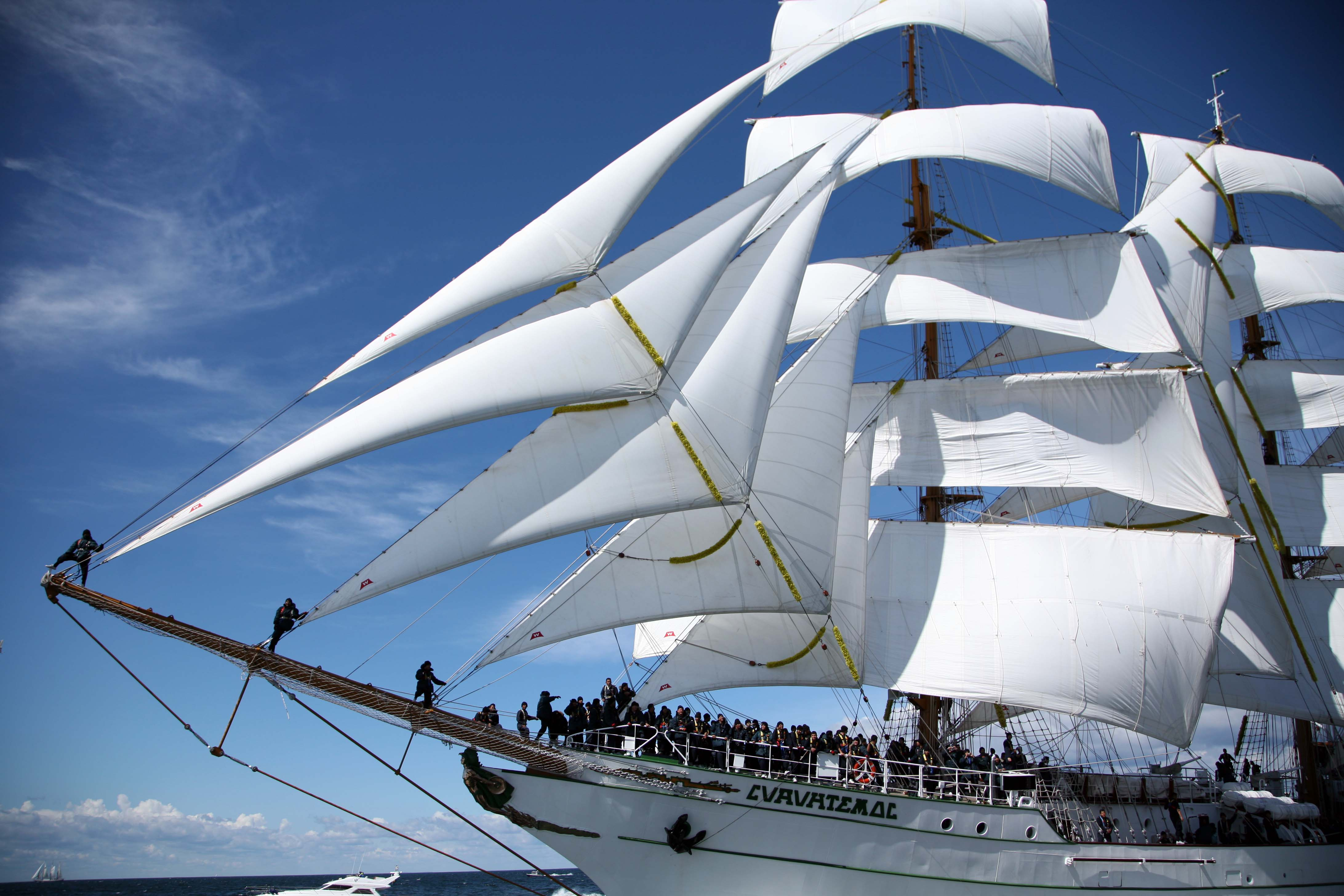 Cuauhtemoc, staysails